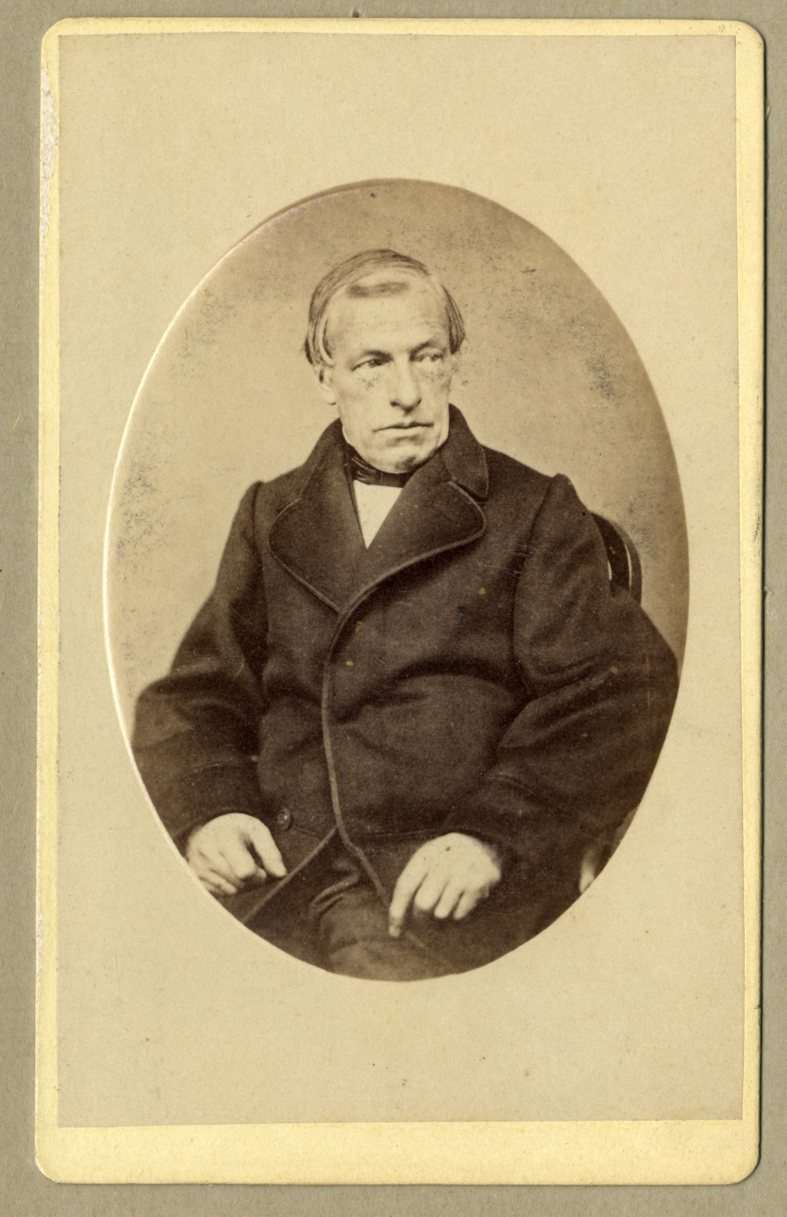 Portret van J. Rijnbout, geboren 1800, beeldhouwer te Utrecht , overleden 1868. Te halve lijve van voren, zittend, in ovaal.